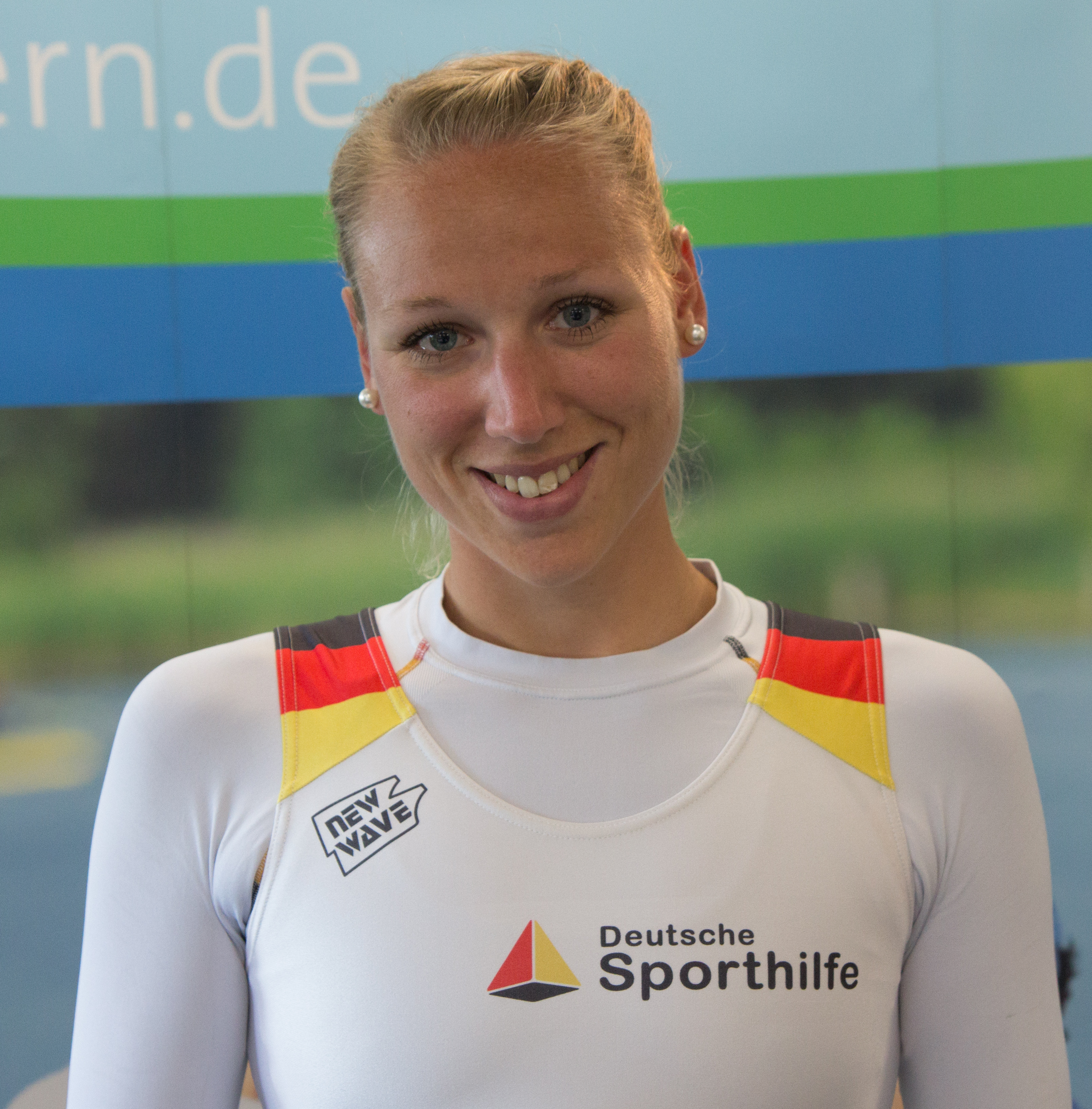 Melanie Hansen beim Medientag des Deutschen Ruderverbandes am 6. September 2017 in der Ruderakademie in Ratzeburg.